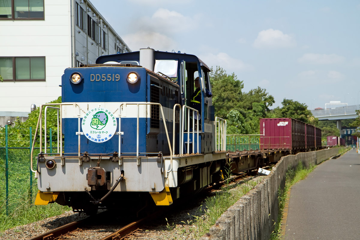 神奈川臨海鉄道本牧線をゆく貨物列車